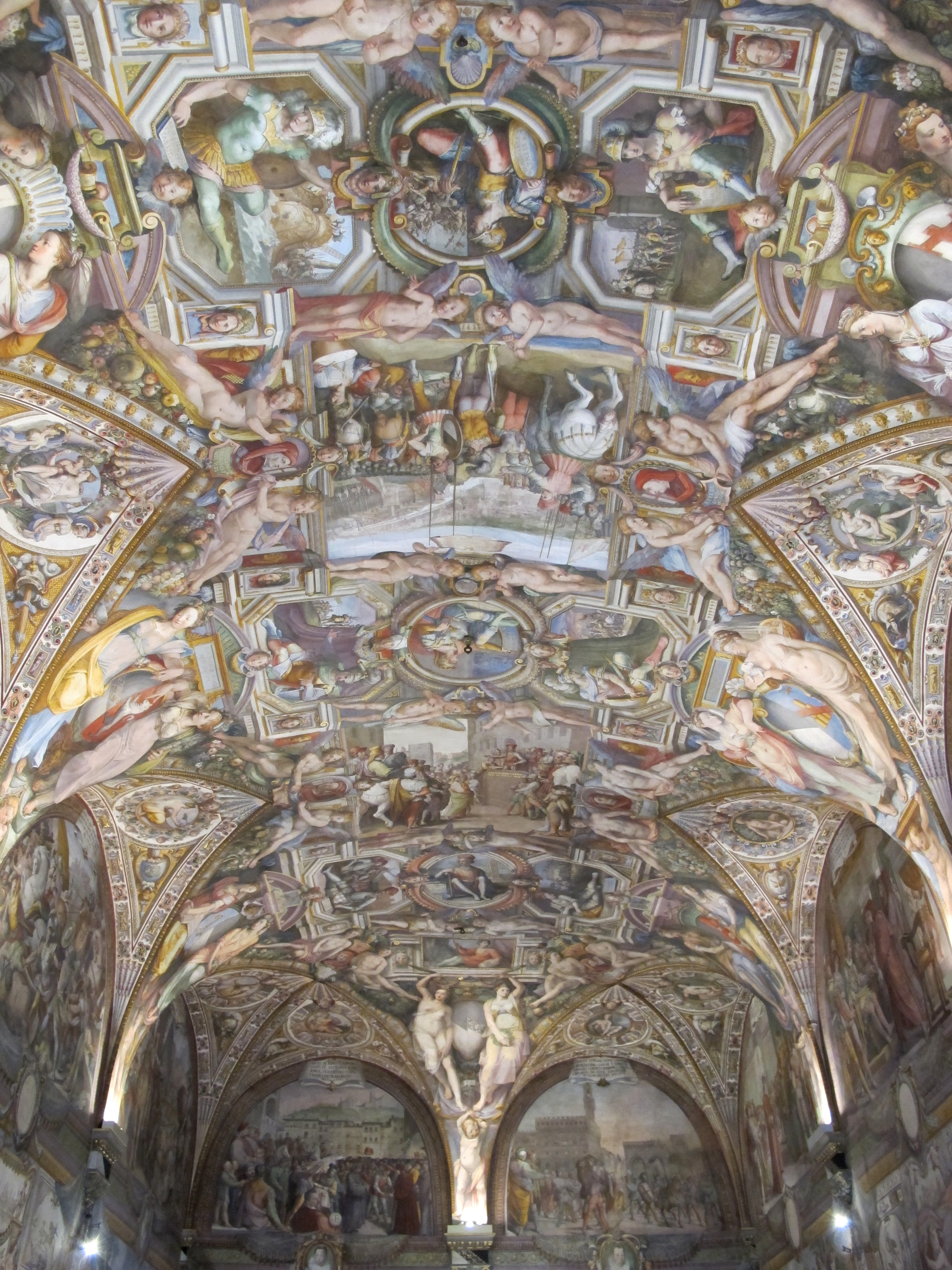 Palazzo capponi-vettori, salone poccetti, volta, veduta